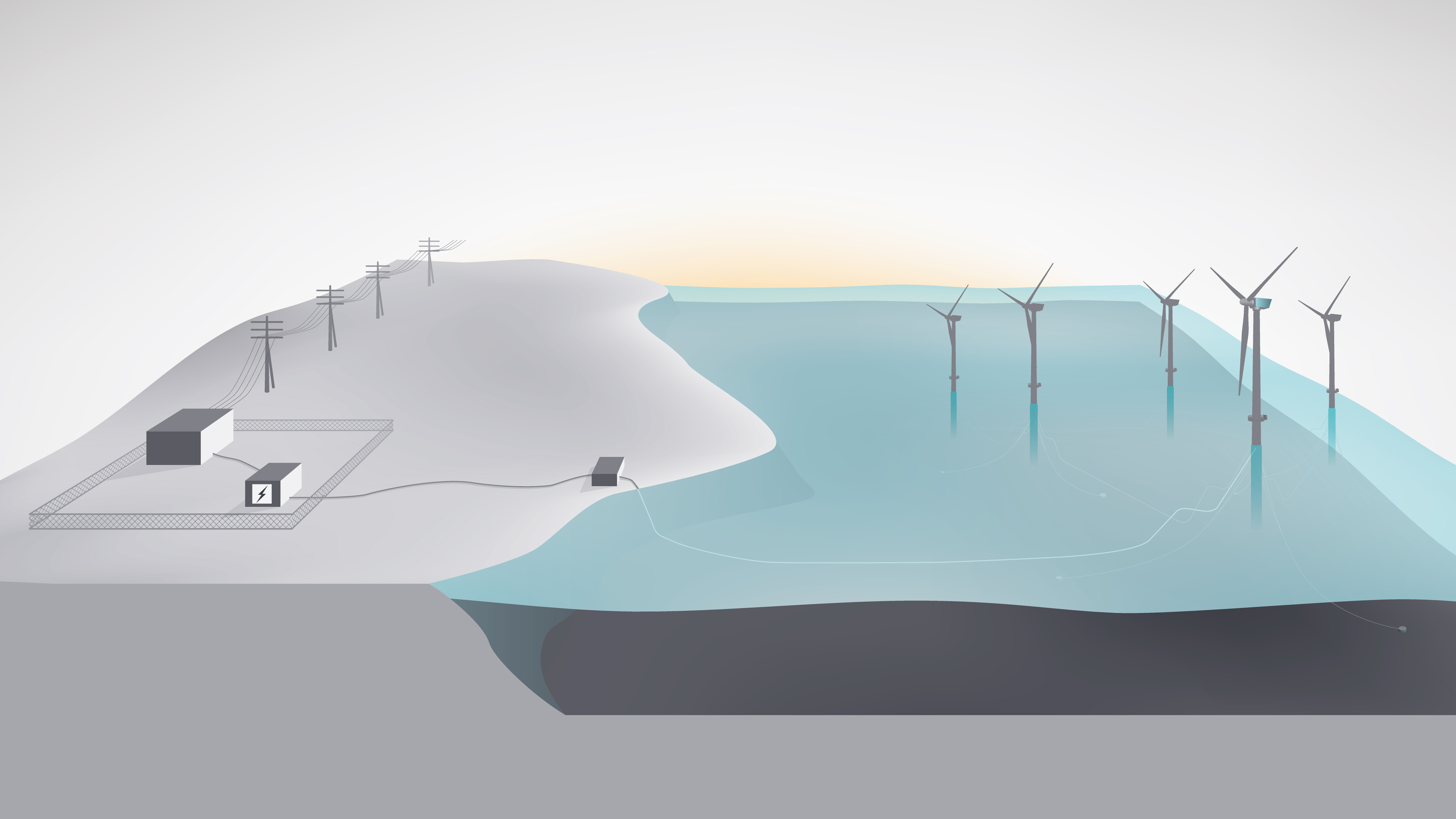 Equinors Batwind-batteri, eksempelskisse